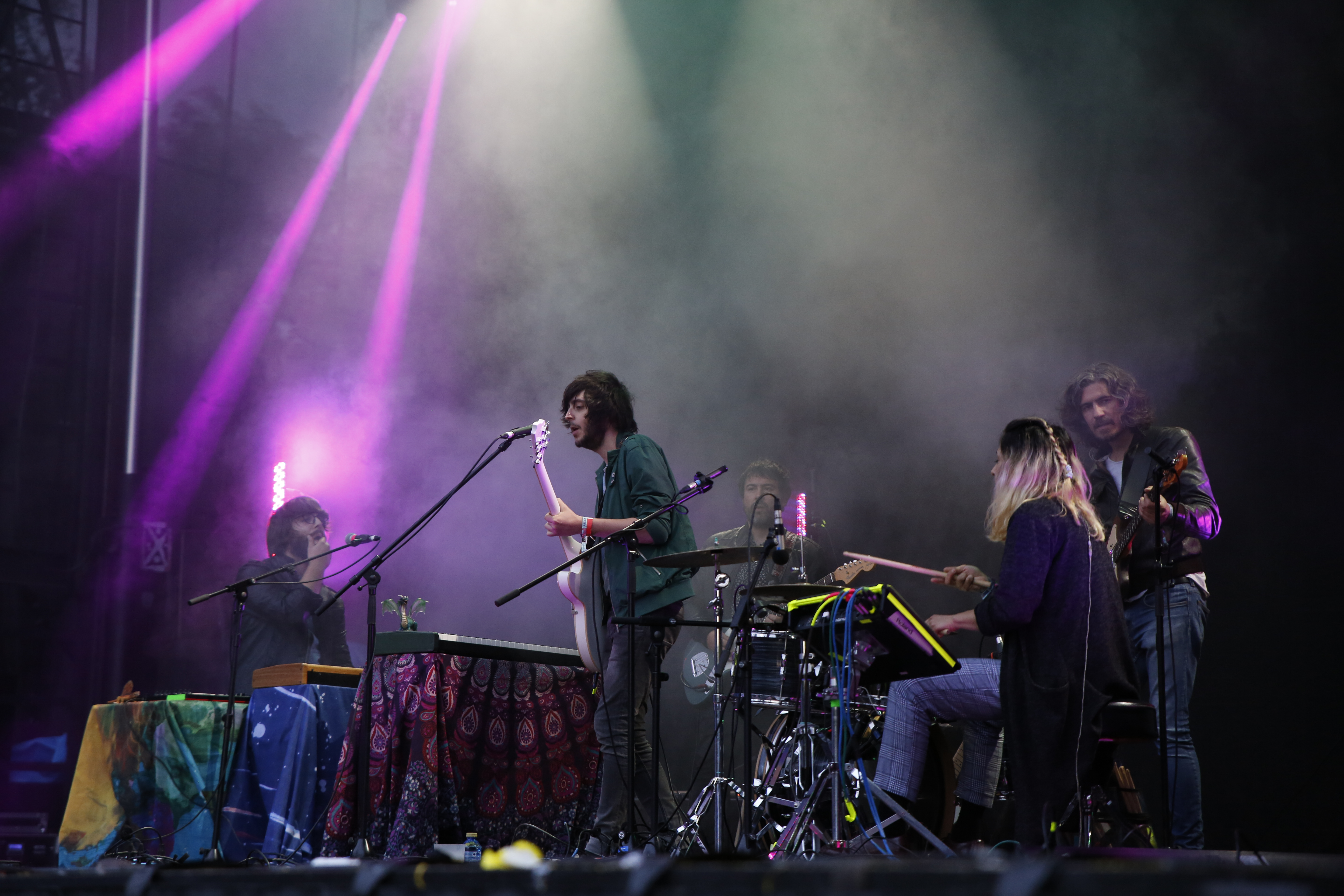 El grupo Rufus T. Firefly en el festival Palencia Sonora 2018.